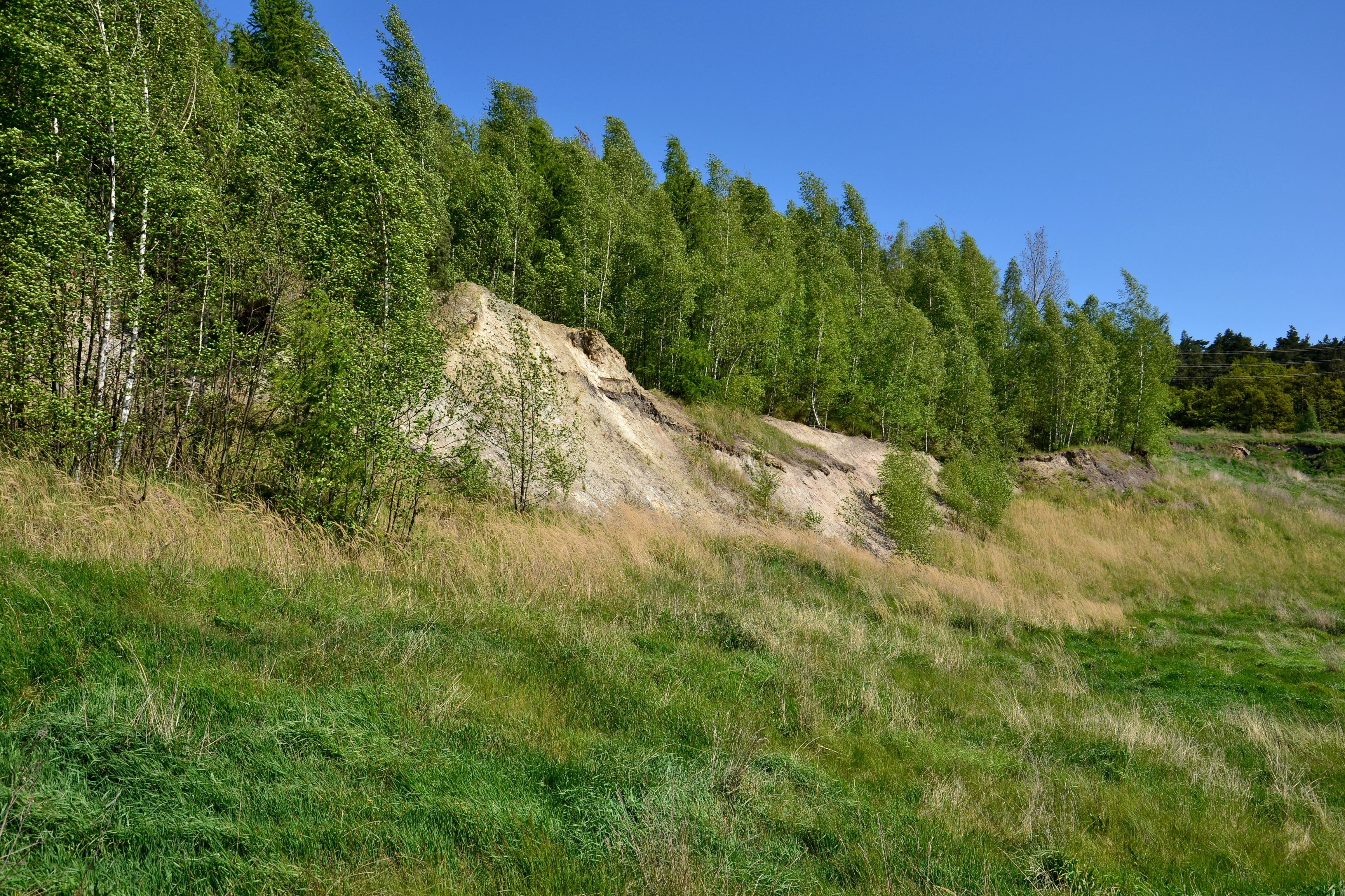 Místo, kde se nacházela přírodní památka